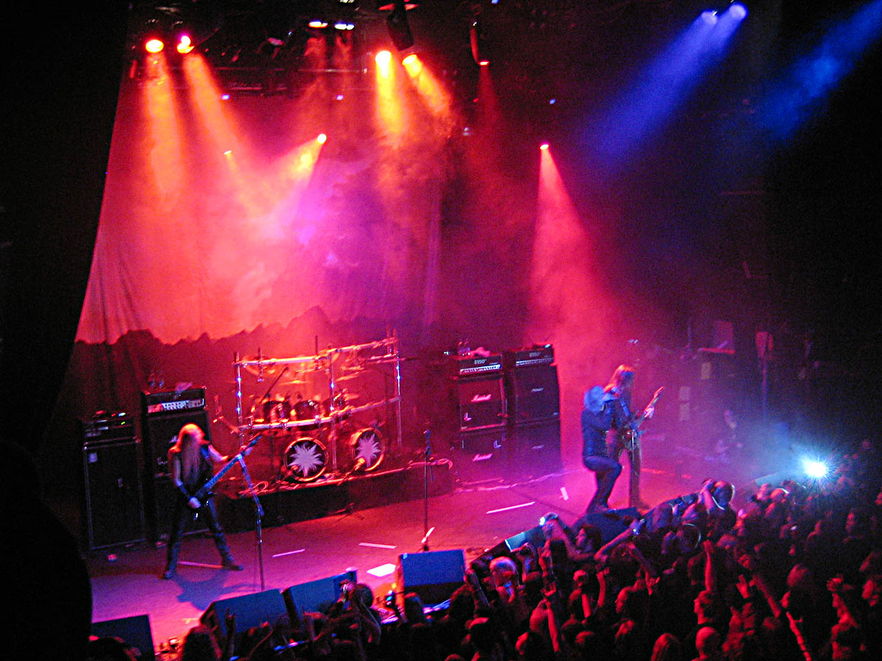 Keep of Kalessin actuando en el Inferno Metal Festival.